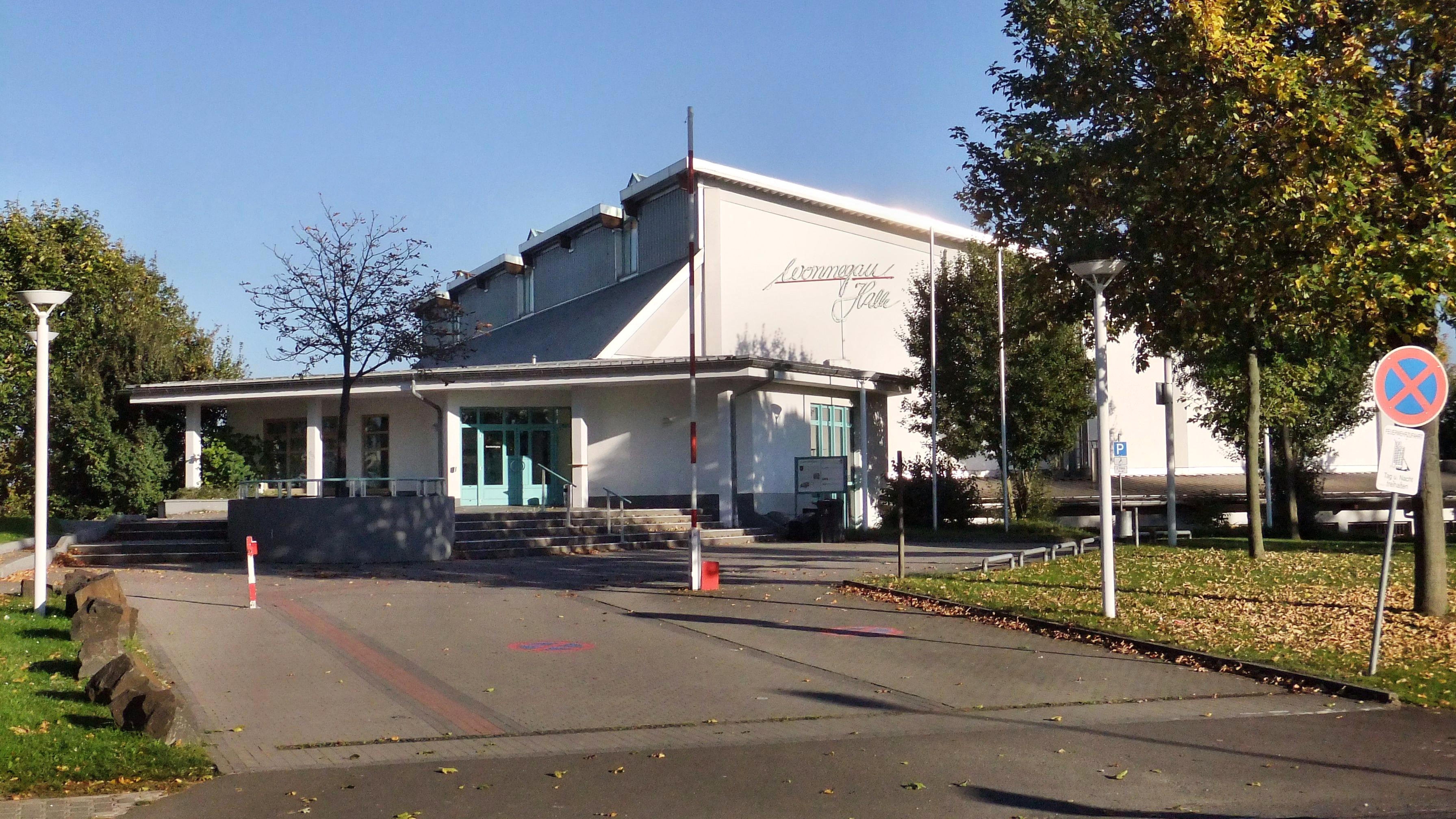 Die Turnhalle Wonnegau-Halle im rheinhessischen Osthofen in Rheinland-Pfalz (Deutschland)